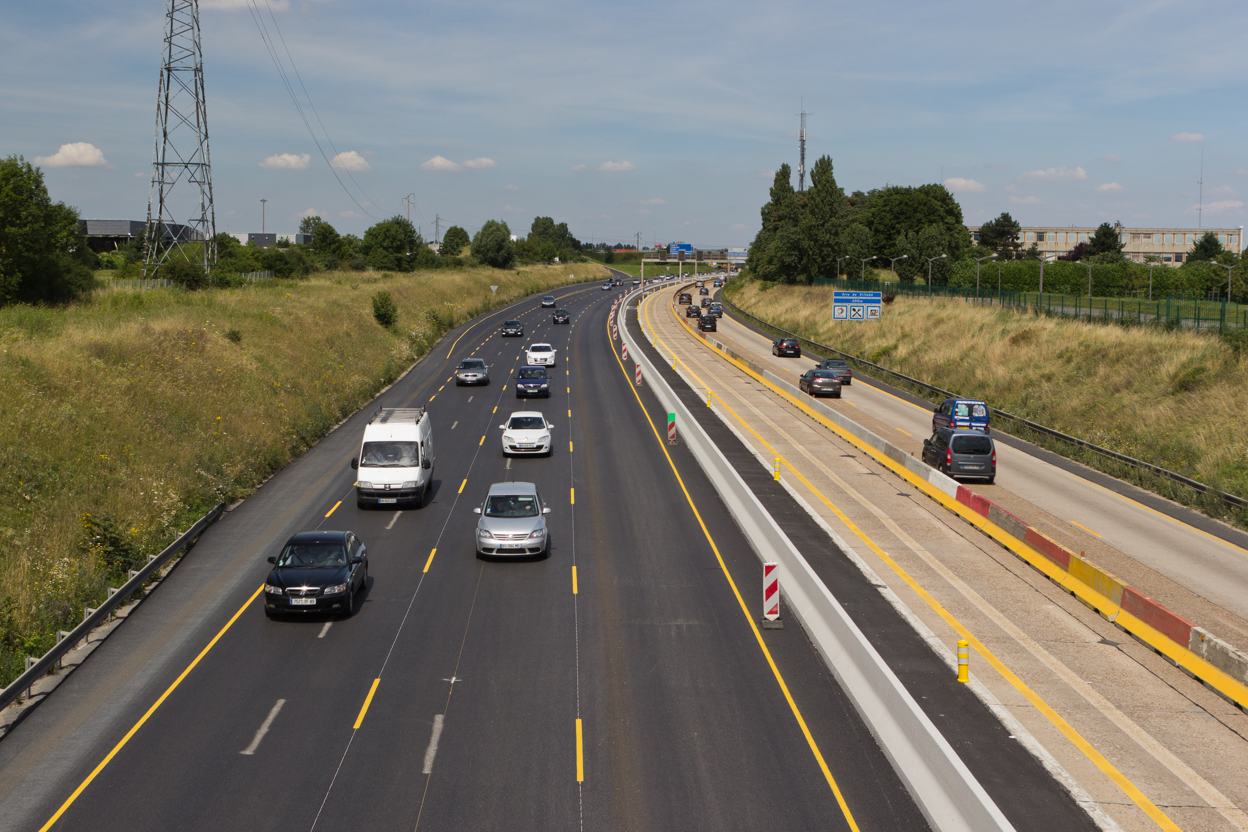 Rénovation de la chaussée l’autoroute française A6 à Villabé en juillet 2012. La rénovation de la chaussée du sens Paris-Province est majoritairement terminée (depuis la Francilienne au pont du stade de Villabé). Communes de Villabé, département de l'Essonne. France